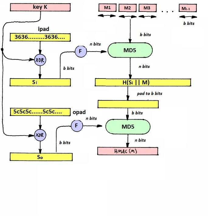 Эффективное представление для компьютерной реализации